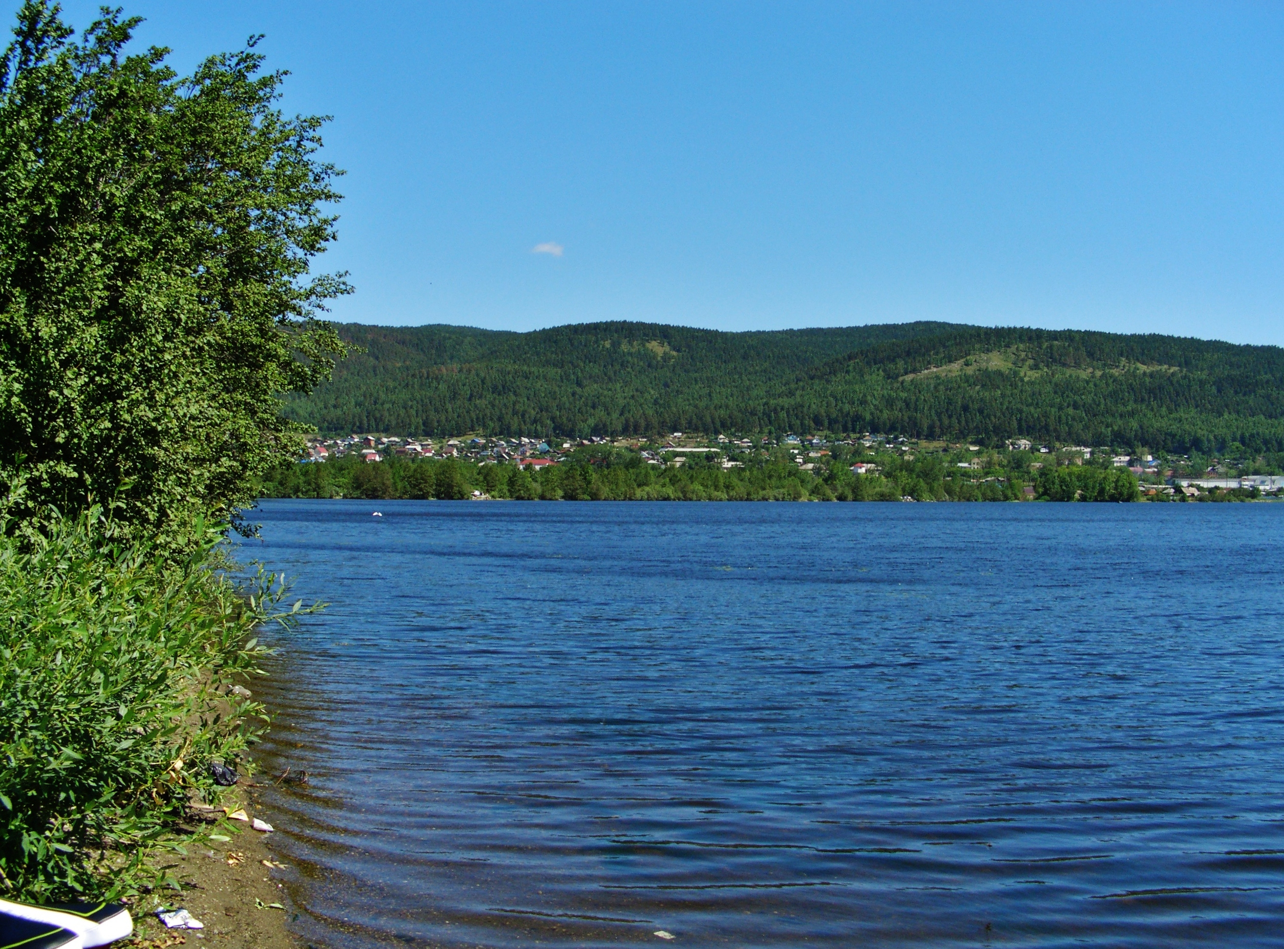 Ильменское озеро.